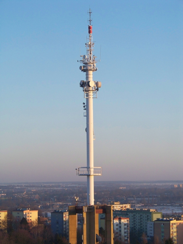 RTON Lublin